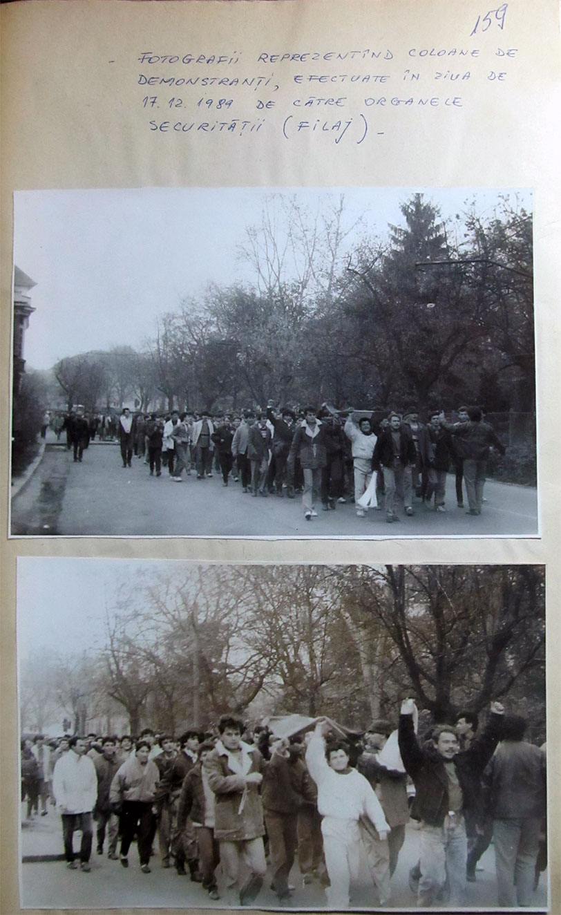 Fotografii efectuate de Securitate (filaj) (Timisoara, 17.12.1989) - anexa dosar penal nr. 4/P/1990